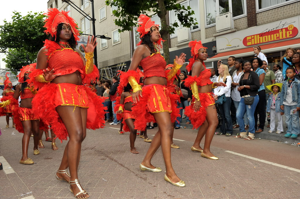 Zomercarnaval Rotterdam 2010